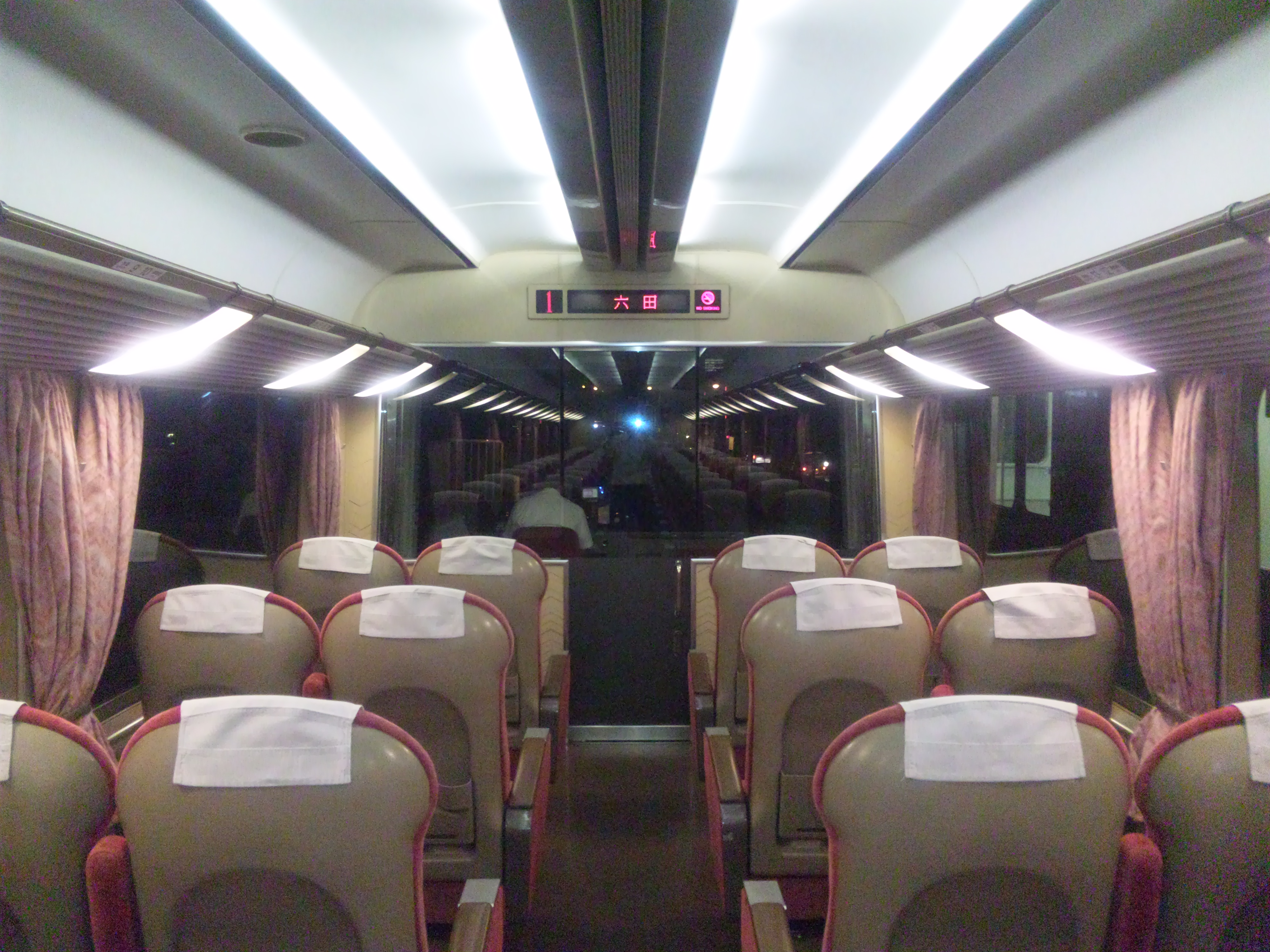 近鉄26000系電車の前面展望